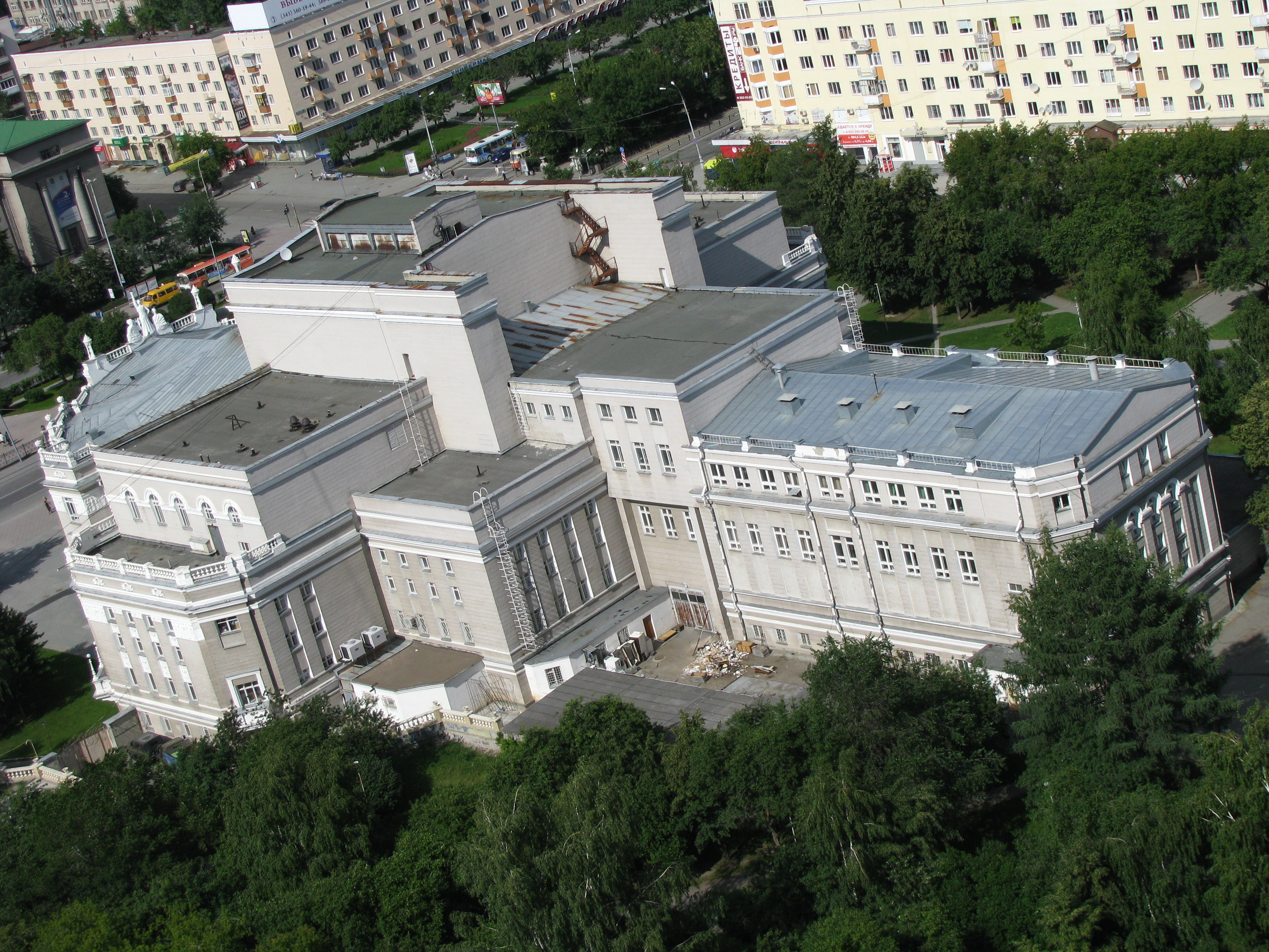 Екатеринбургский оперный театр с высоты